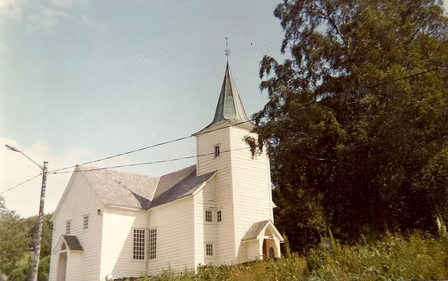 Eikefjord kirke